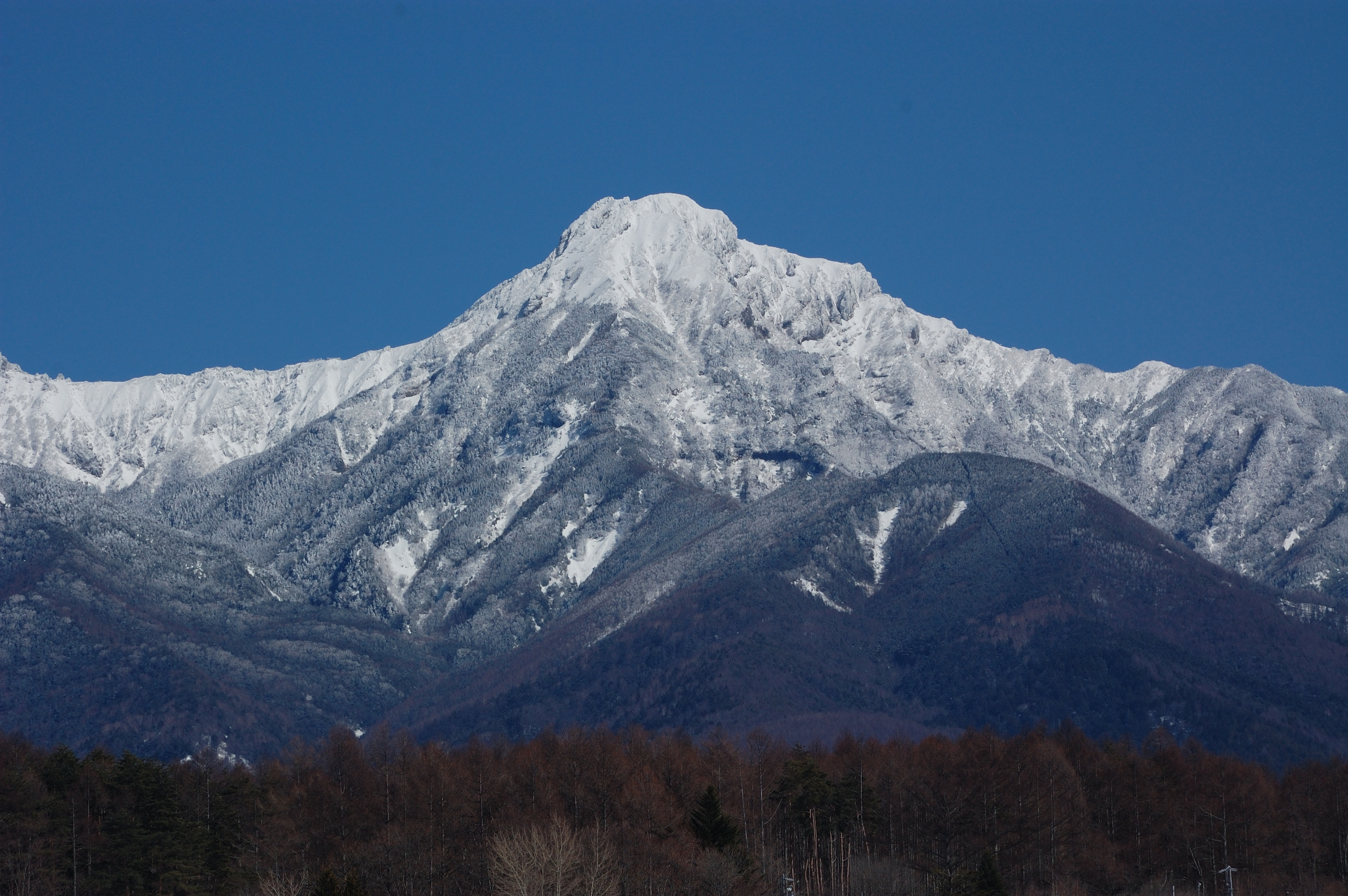 八ヶ岳 阿弥陀岳